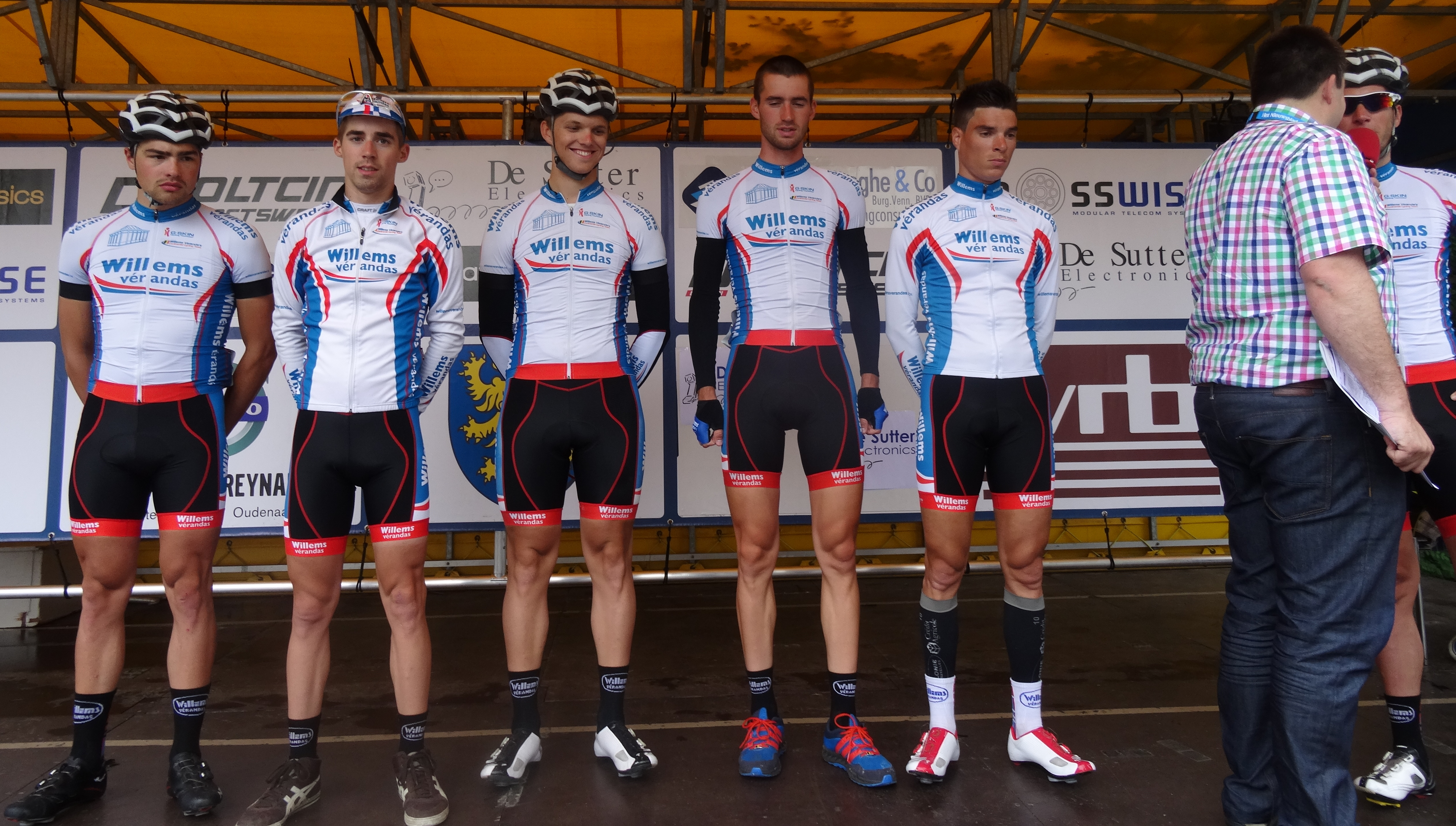 Reportage photographique réalisé le samedi 5 juillet à l'occasion du départ et de l'arrivée du Circuit Het Nieuwsblad espoirs 2014 à Grotenberge (Zottegem), Belgique.